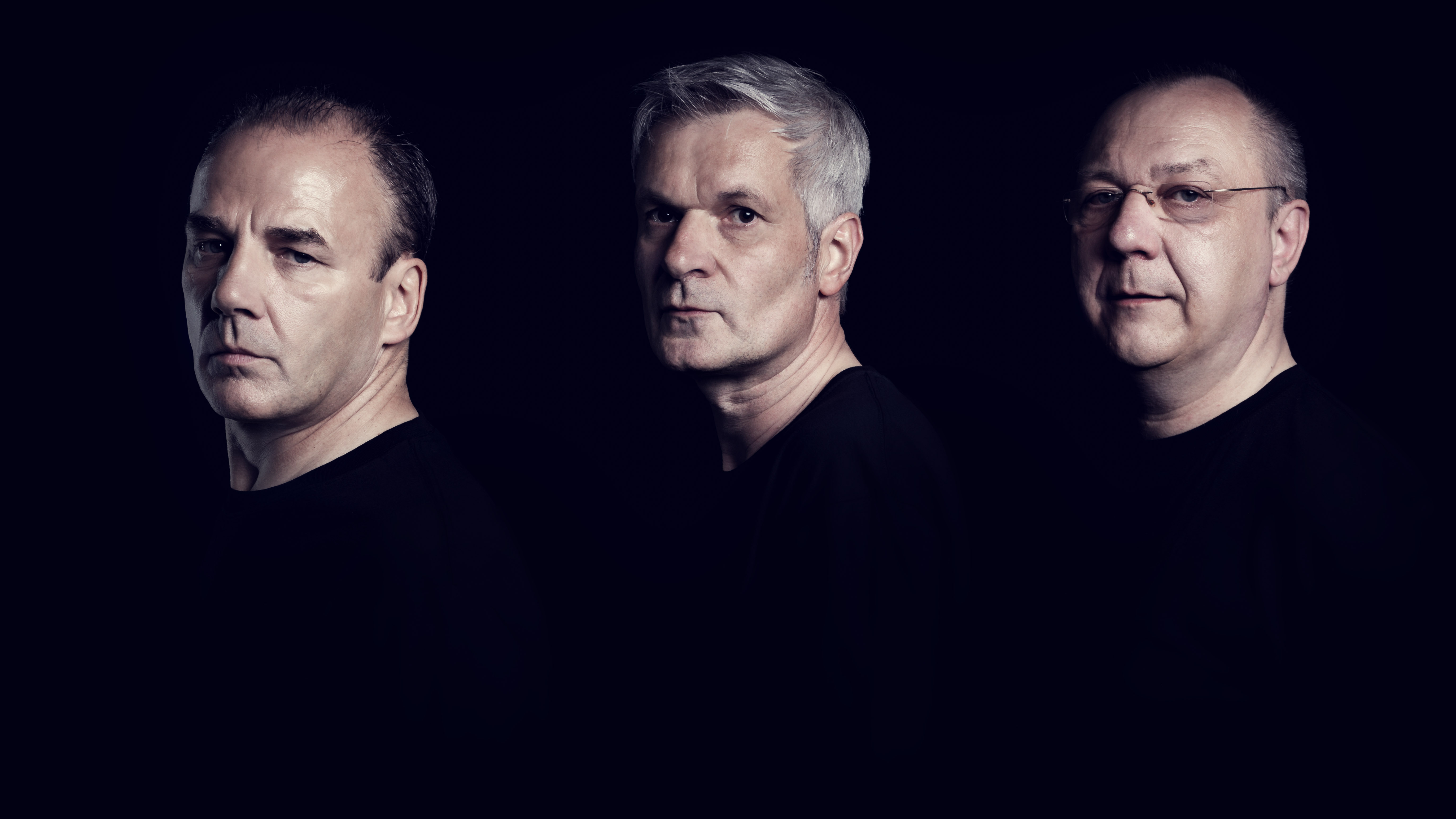 Eyesberg